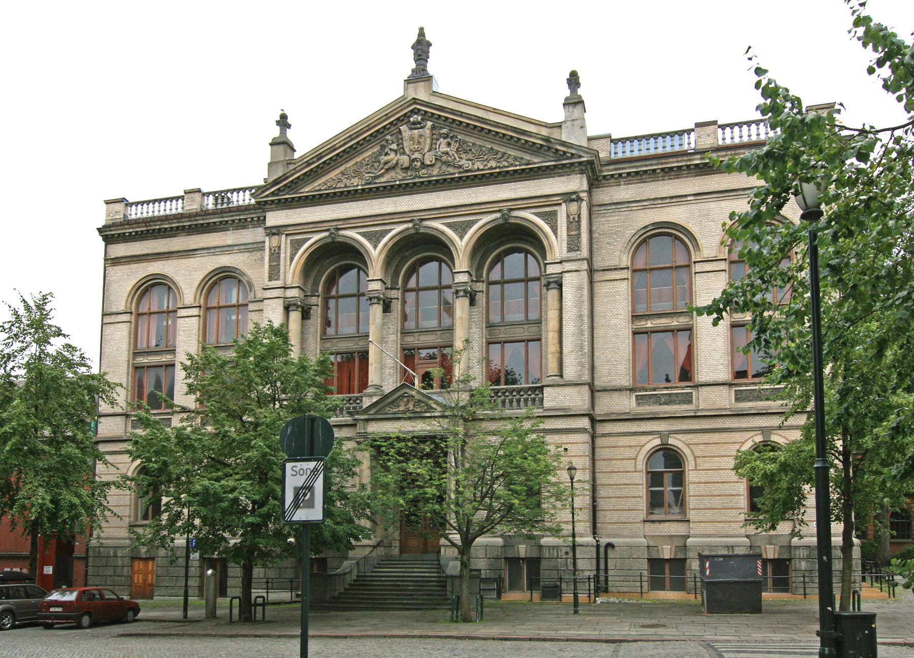 Frimurerlosjen, kongens gate 3, Trondheim. Bygd 1899. Arkitekter: Karl Norum, Lars Solberg, Johan Christensen, Axel Guldahl d.e. m.fl.